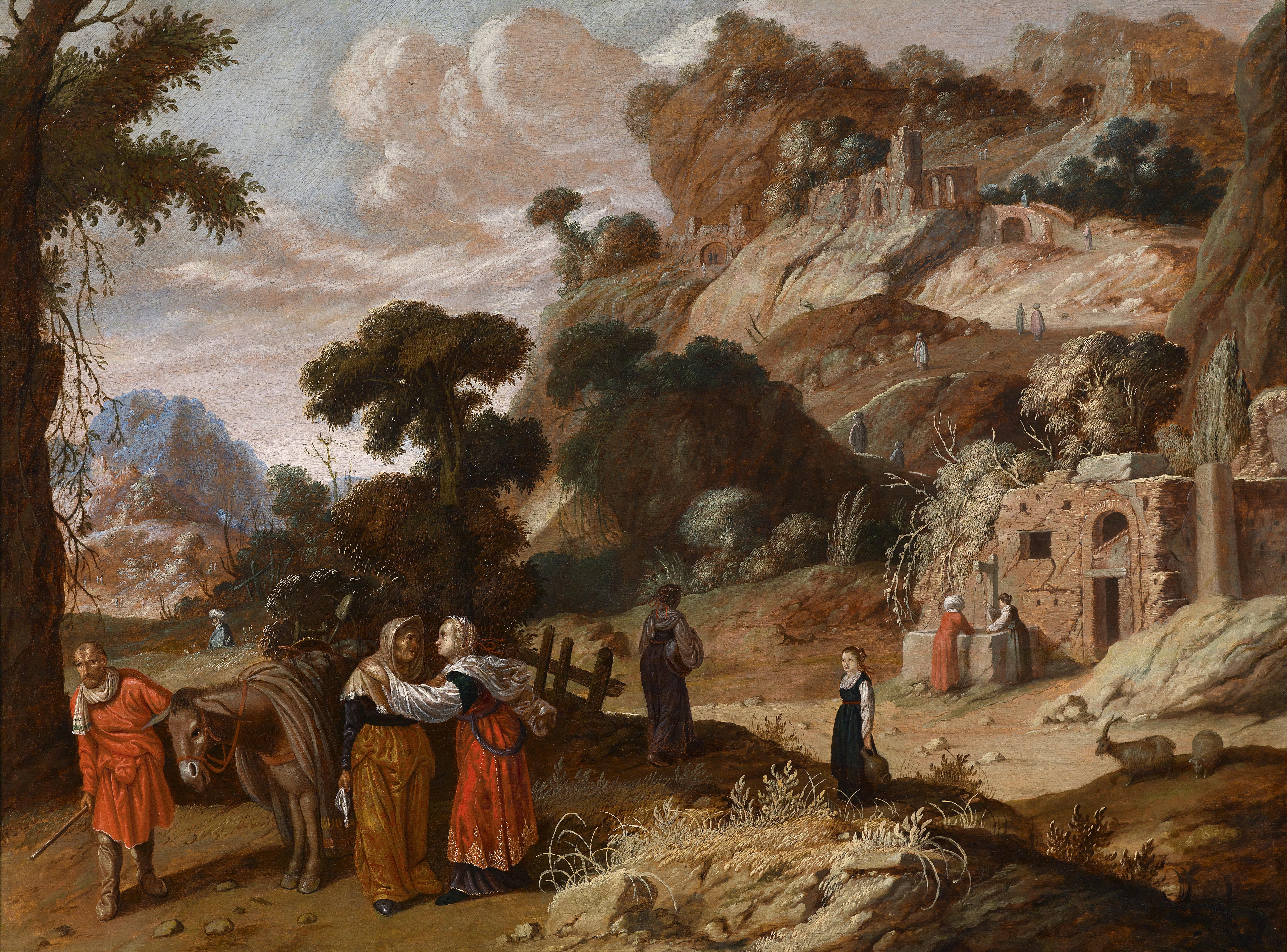 Ruth beschliesst mit Naomi nach Bethlehem zu ziehen (Ruth I, 14-16)